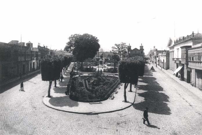 Vista de la Plaza Bolivar, Lima, Peru, en el siglo XIX. Nótese al fondo la iglesia de Santa María de la Caridad, derruida en 1906. Al lado derecho se ve la columnada del Tribunal de la Inquisición.